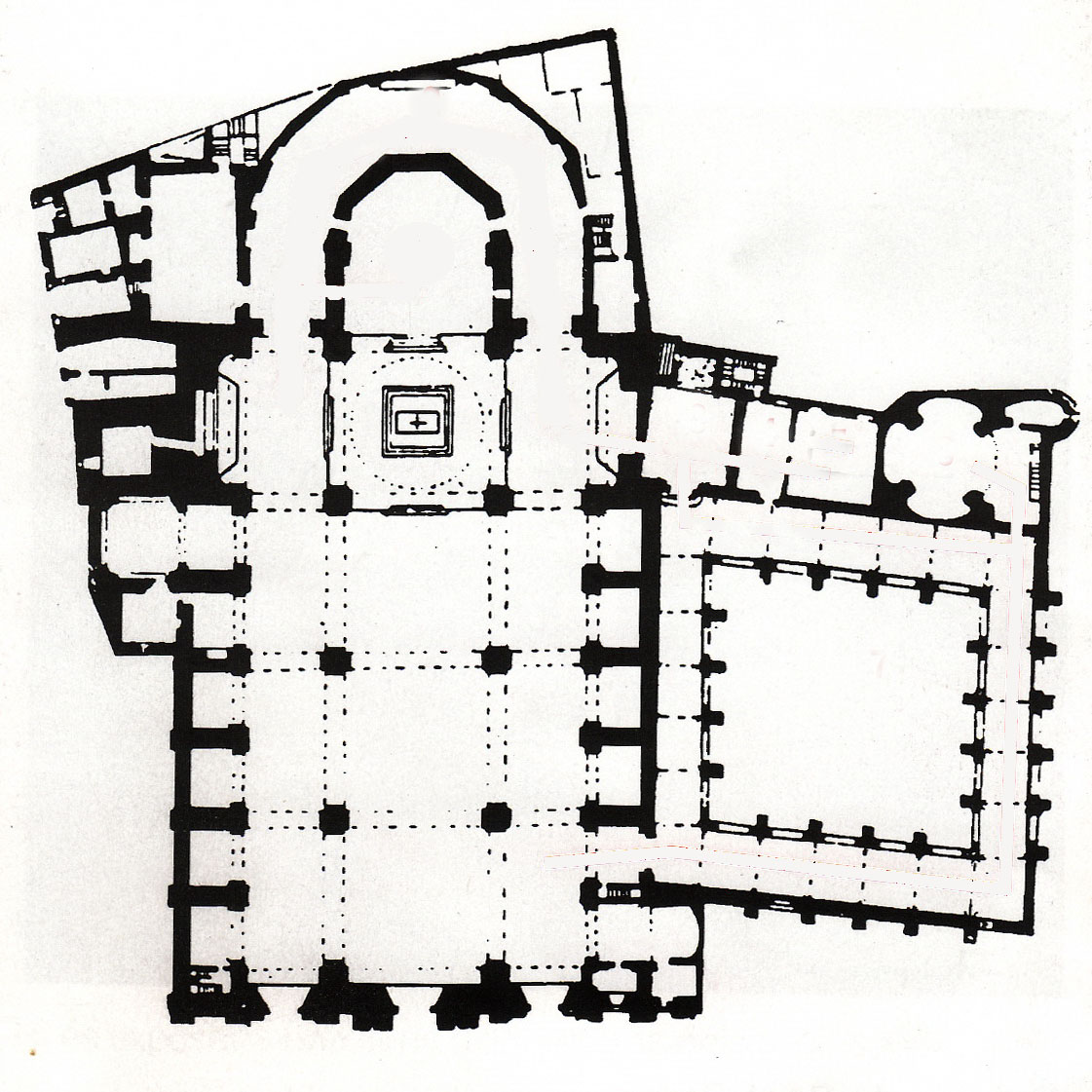 Planta de la catedral de Vic (Catalunya)